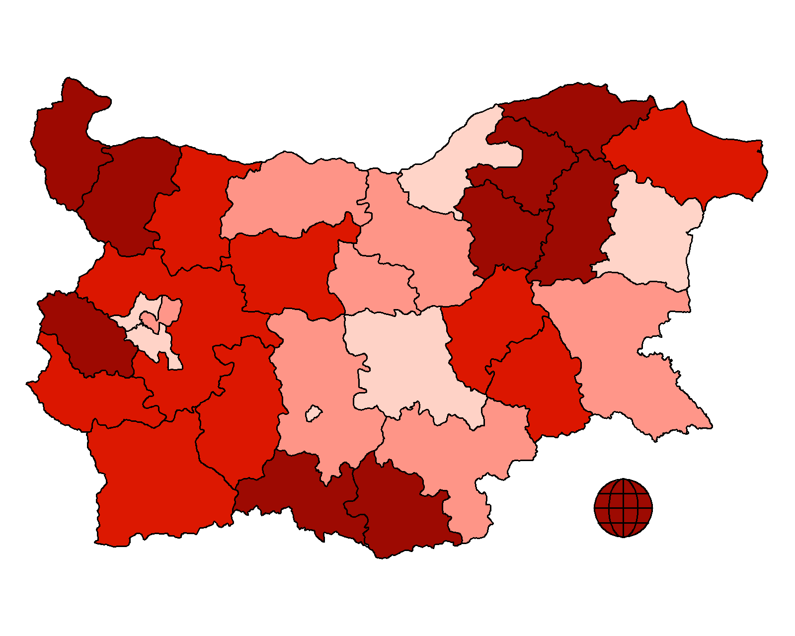 Гласуване по райони за Георги Първанов на първия тур на президентските избори през 2006. Всеки от цветовете съответства на приблизително 1/4 от подадените гласове По тъмният цвят съответства на получен по-голям процент от гласовете